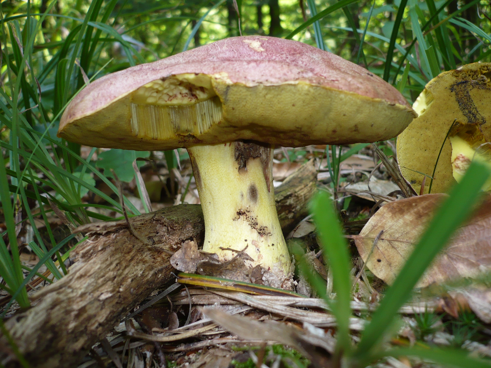 Boletus regius Krombholz Location: Kleiner Steinbachgraben, Neupurkersdorf, Bezirk Wien-Umgebung, Lower Austria, Austria Observation Notes: [admin – Sat Aug 14 02:01:51 0000 2010]: Changed location name from ‘Kleiner Steinbachgraben,Neupurkersdorf,Bezirk Wien-Umgebung,Lower Austria,Austia’ to ‘Kleiner Steinbachgraben, Neupurkersdorf, Bezirk Wien-Umgebung, Lower Austria, Austria’ For more information about this, see the observation page at Mushroom Observer.